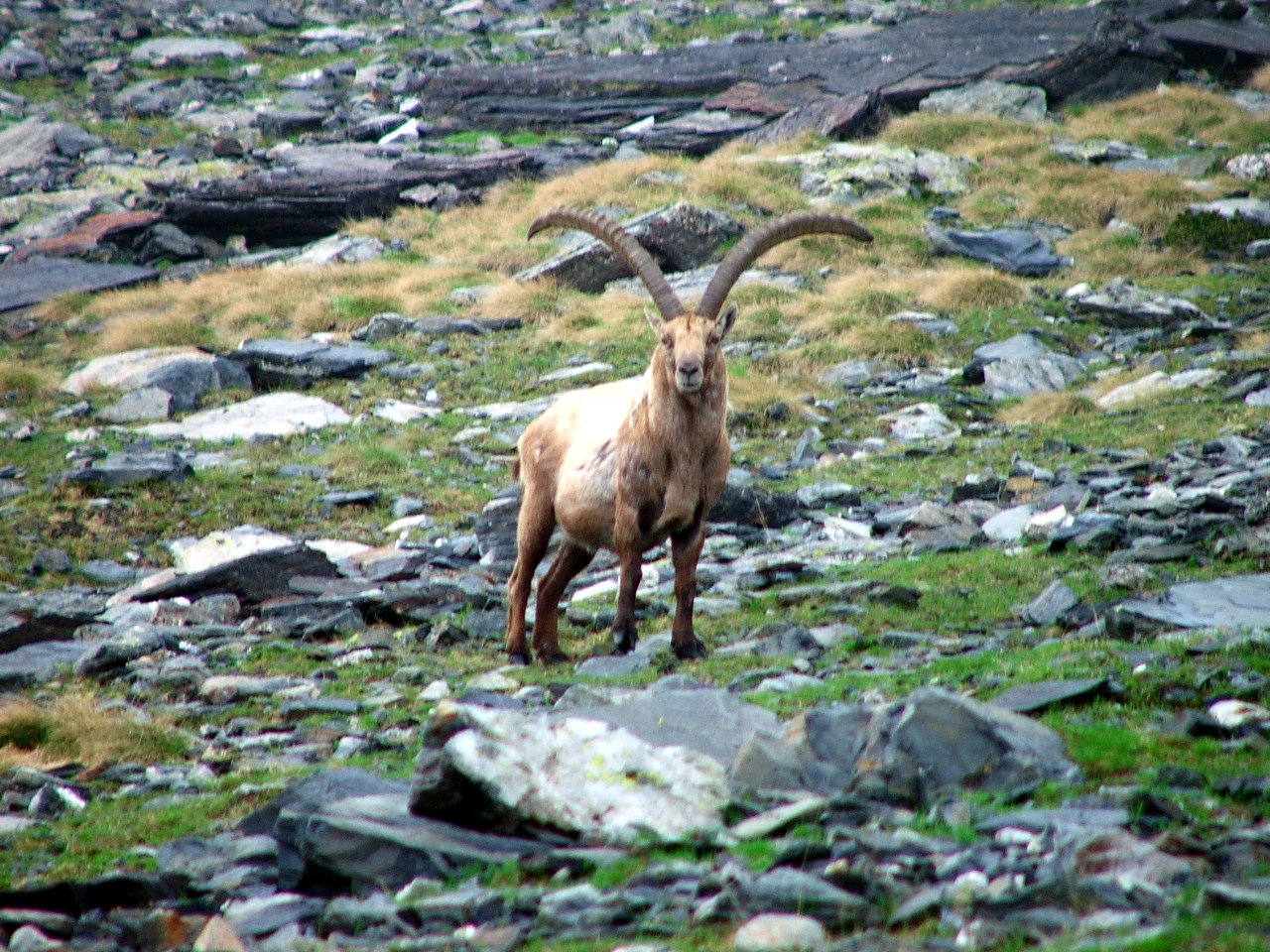 fatta da me